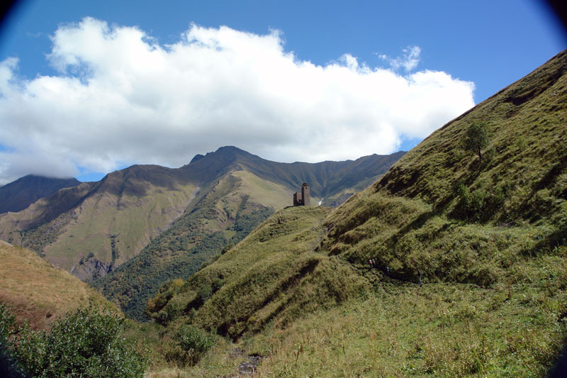 Georgia, Khevsureti